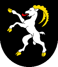 Wappen von Forel Kanton Freiburg Schweiz